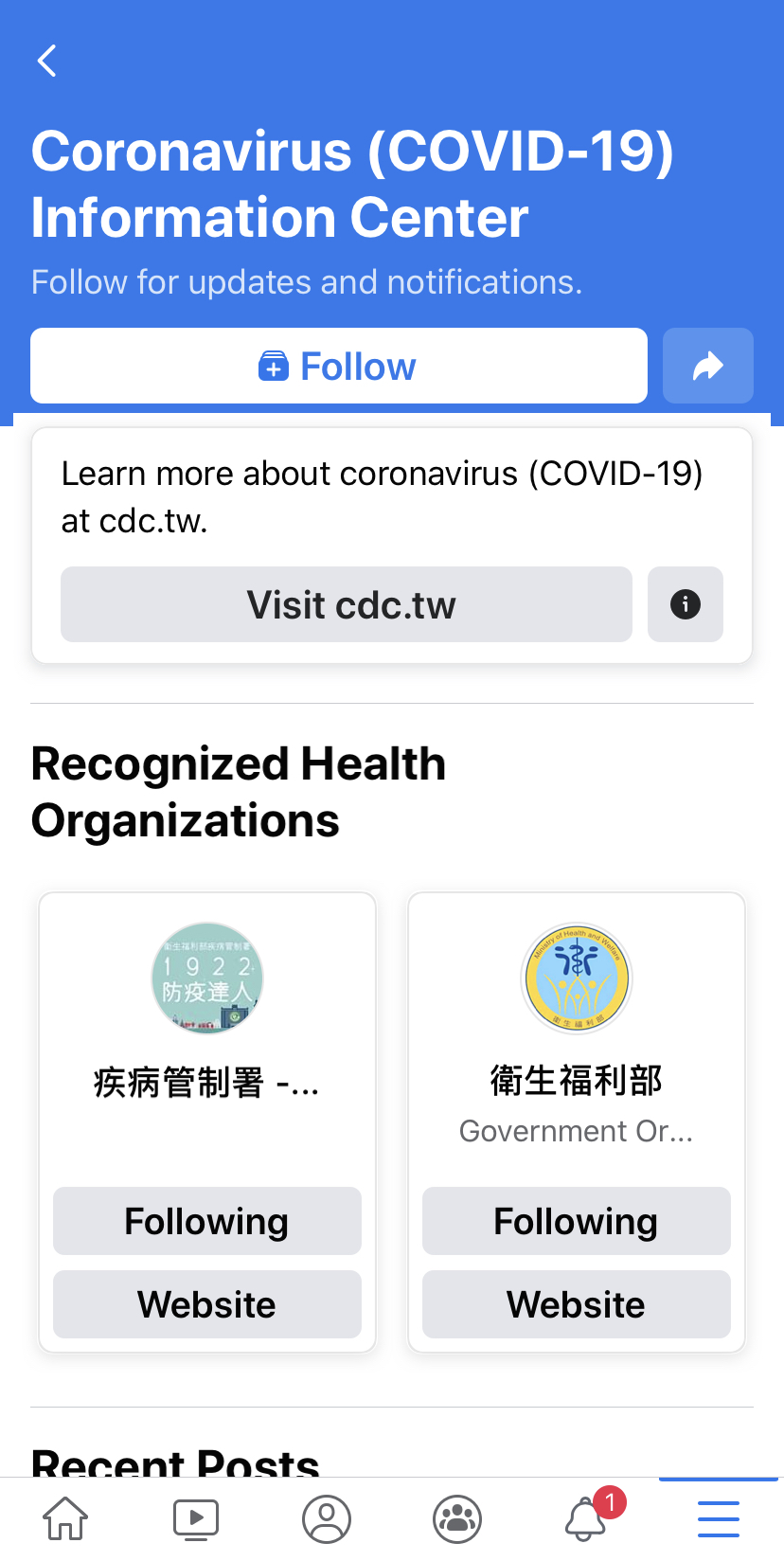 新冠病毒疫情資訊入口，臉書手機App版。